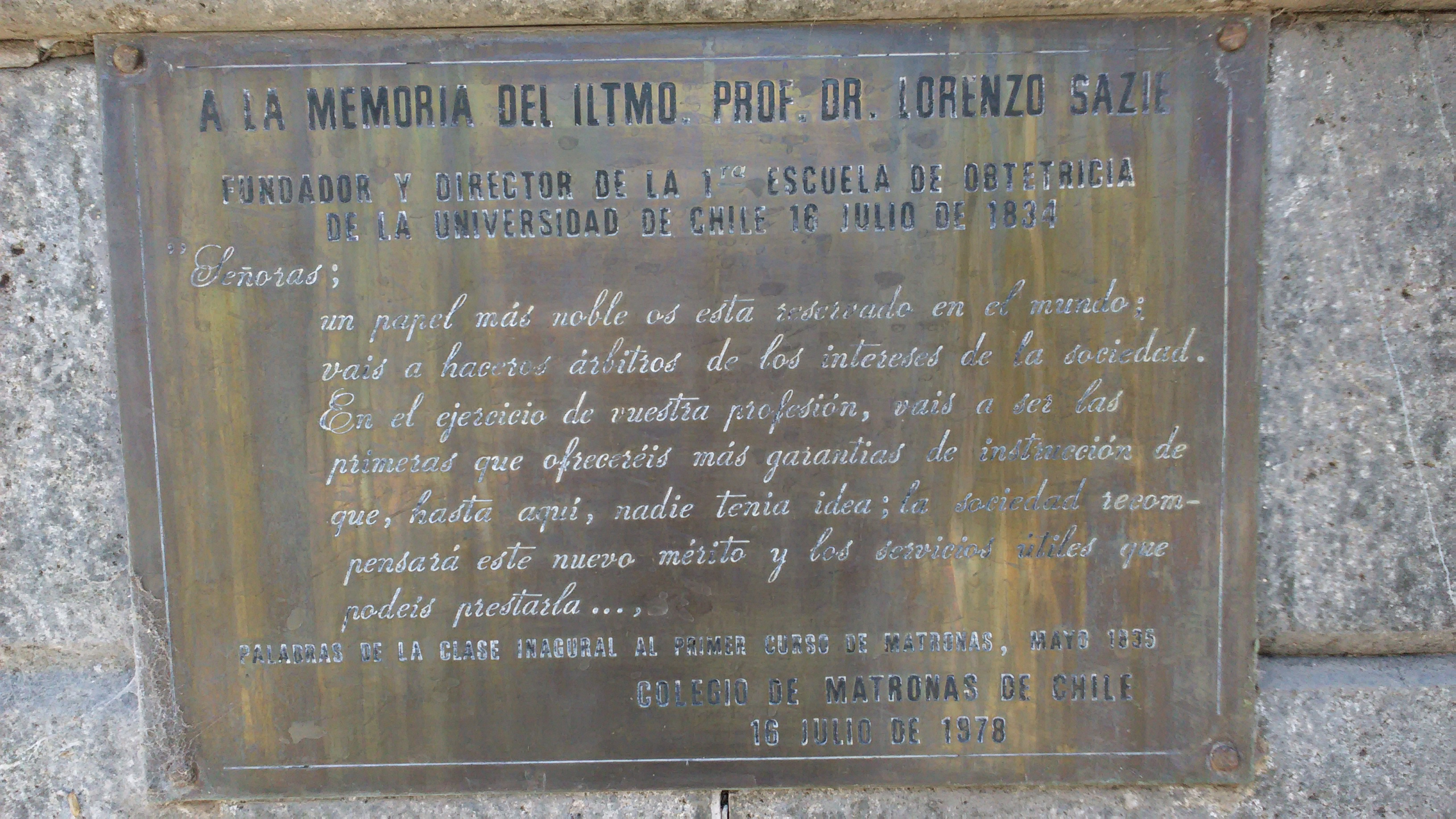 Detalle de la placa en la tumba de Lorenzo Sazié